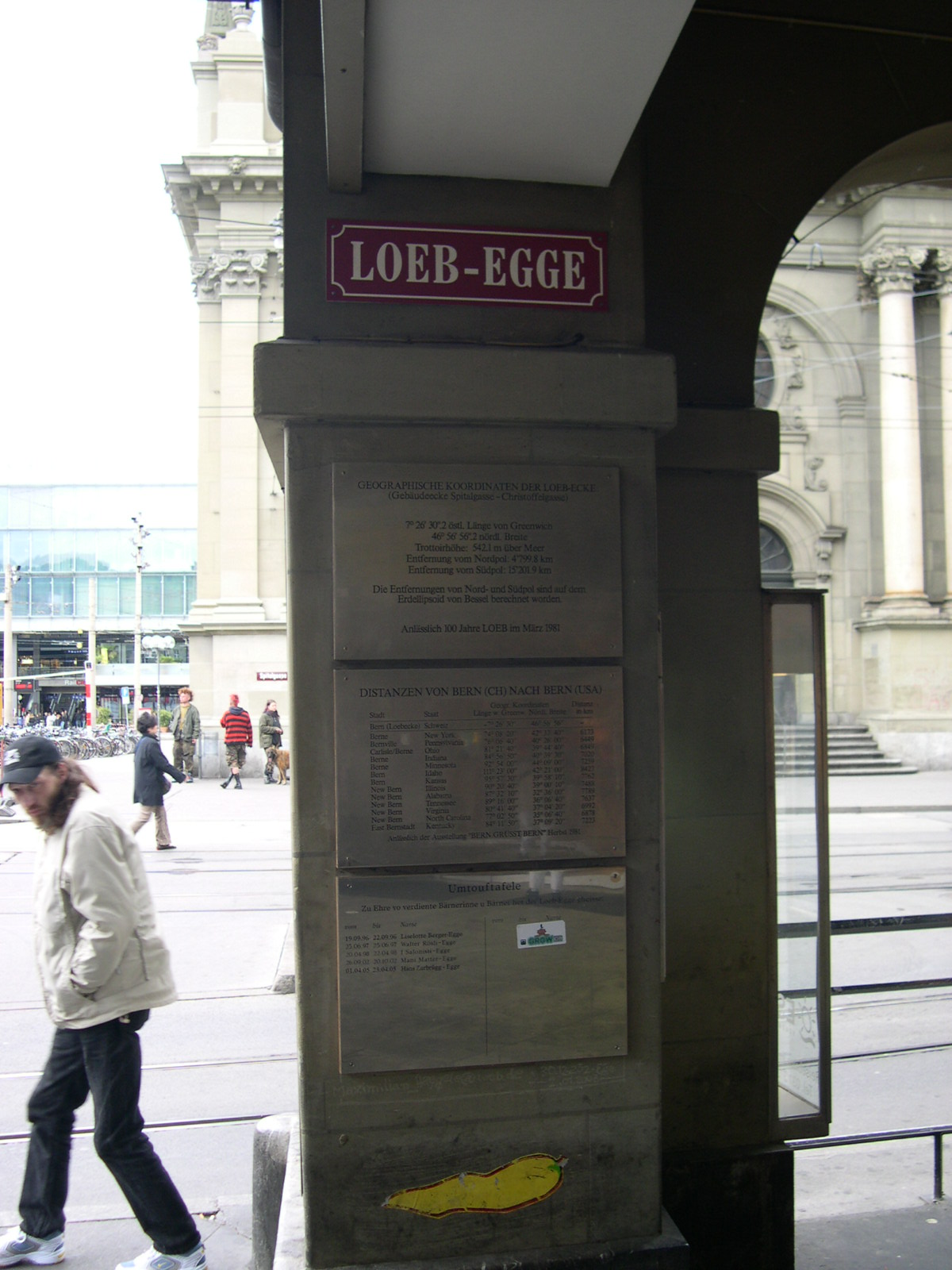 Schilder am Loebegge in Bern